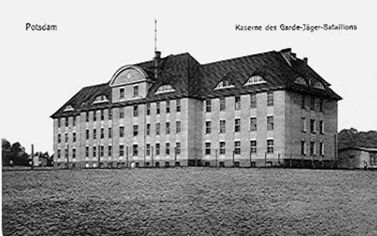 Die Kaserne der Gardejäger in Potsdam